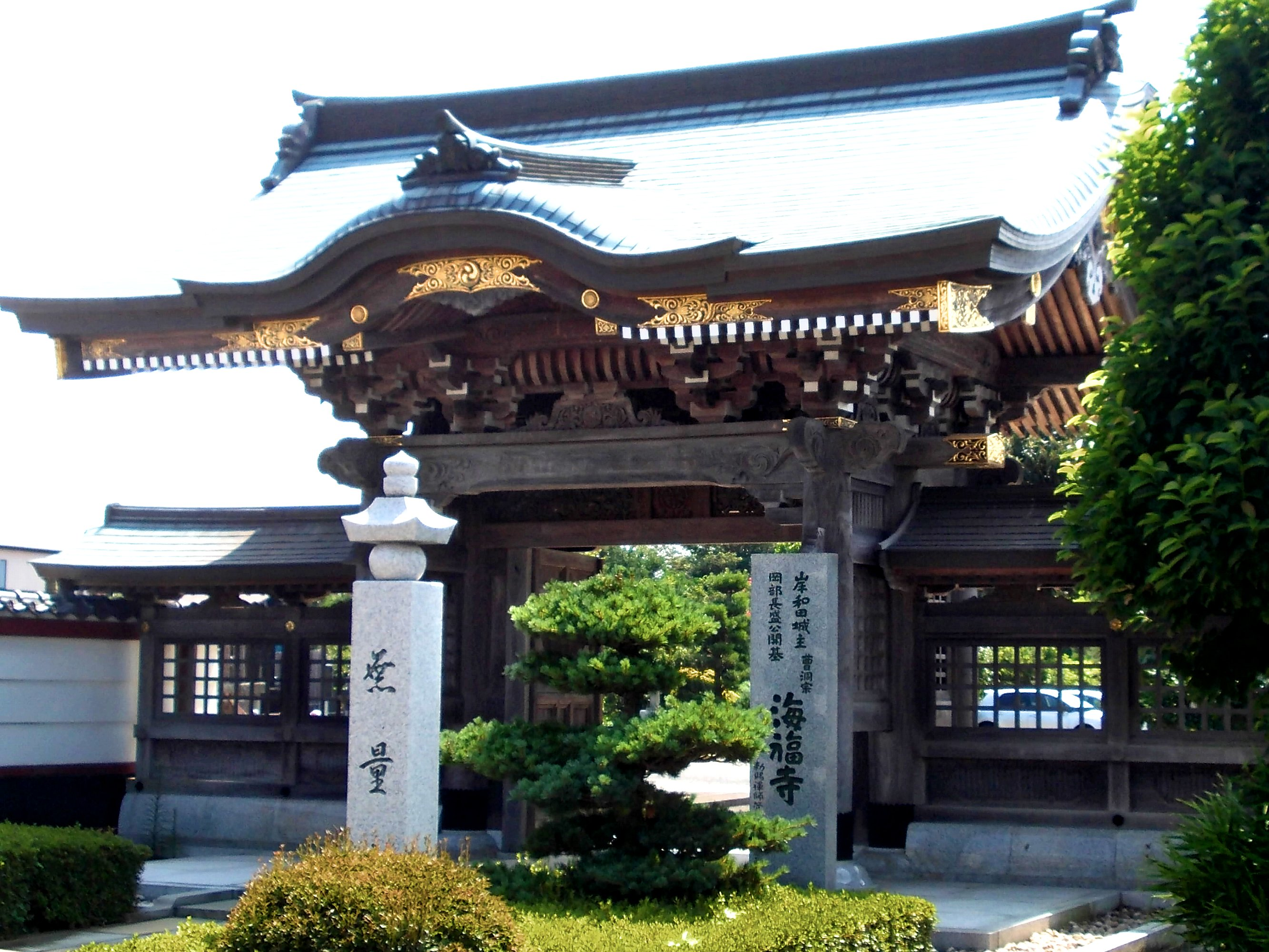 海福寺・山崎藩岡部長盛（1590年）